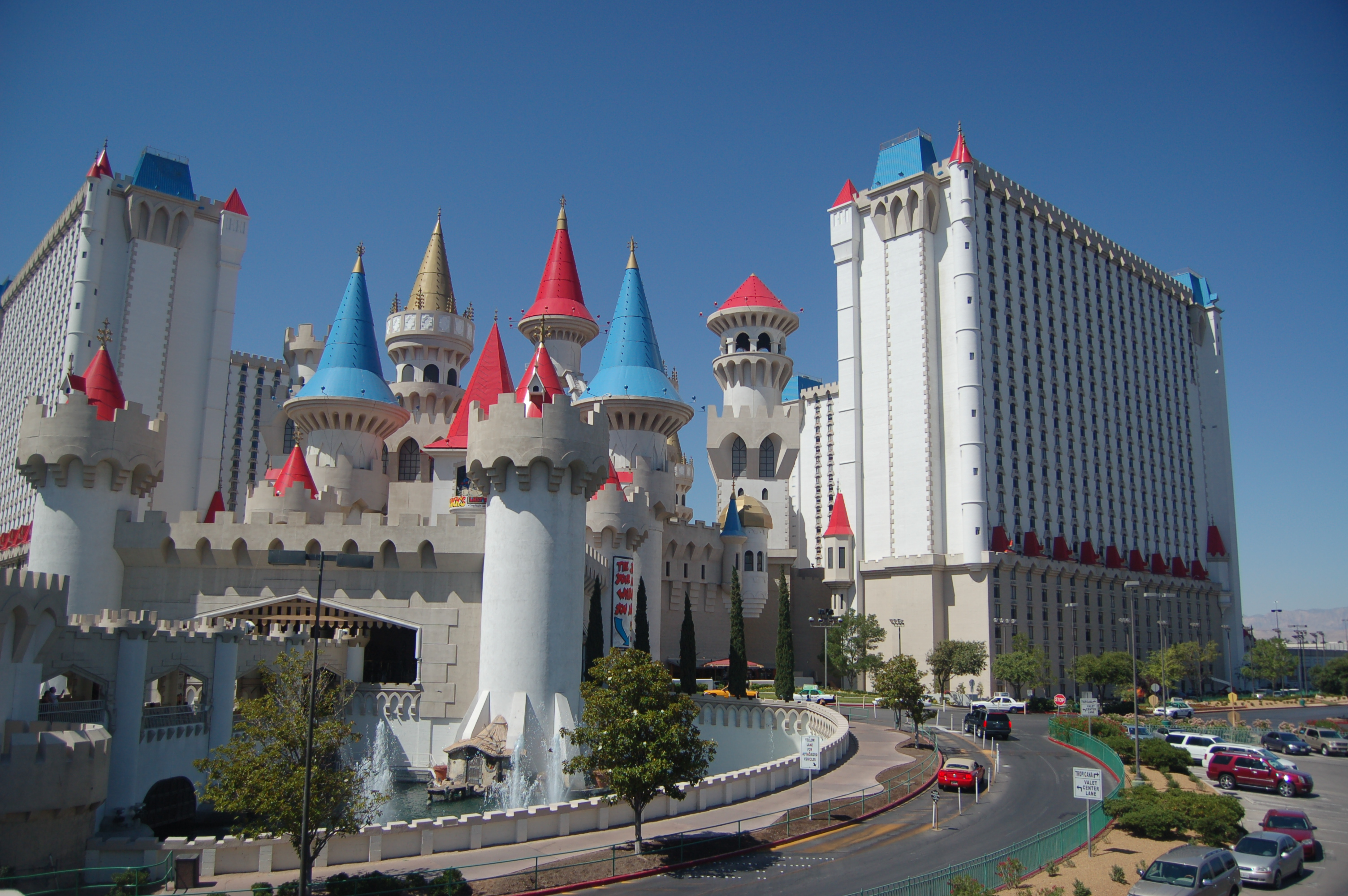 Excalibur, Las Vegas